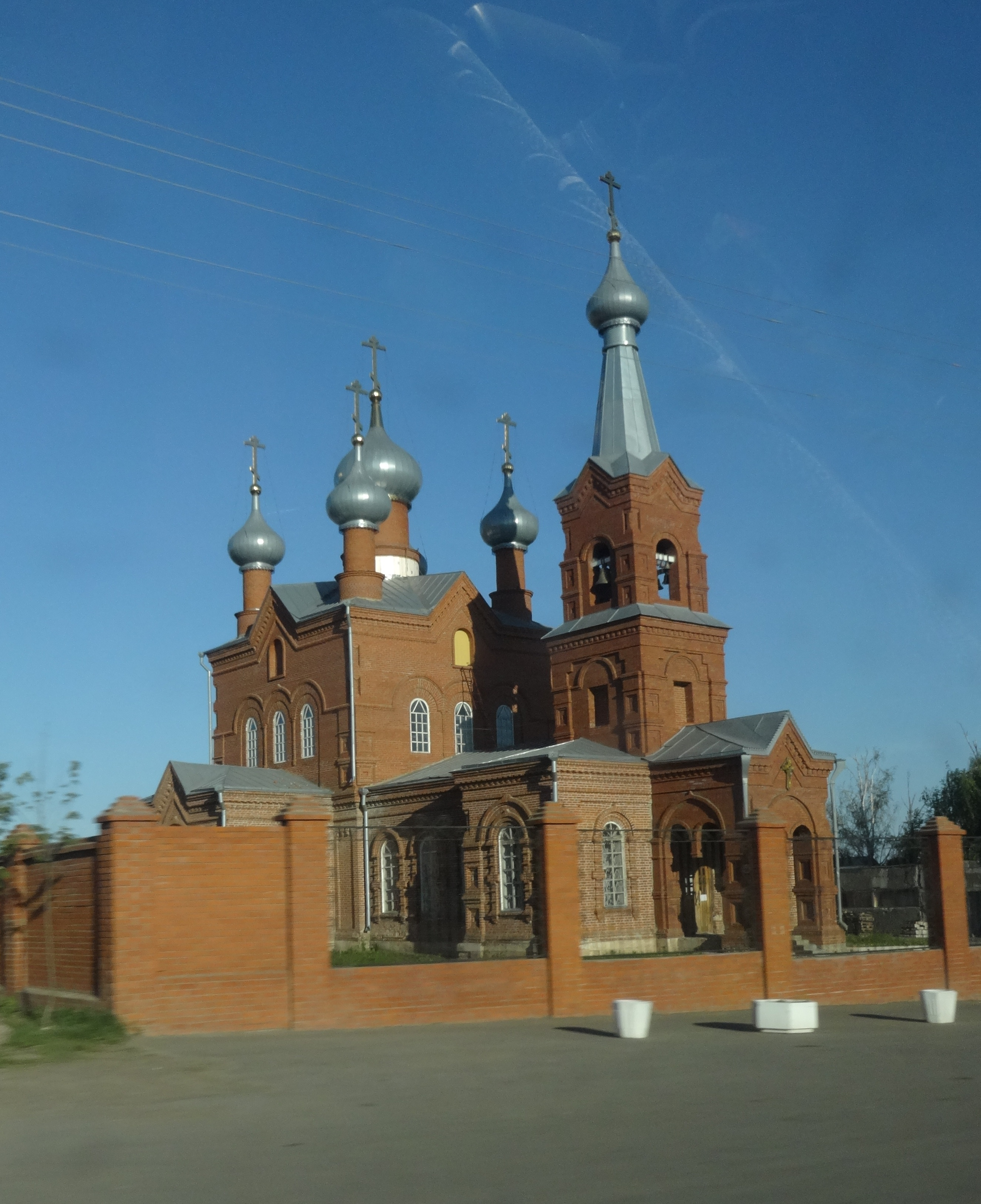 Православный храм в с. Малая Пурга Удмуртской Республики